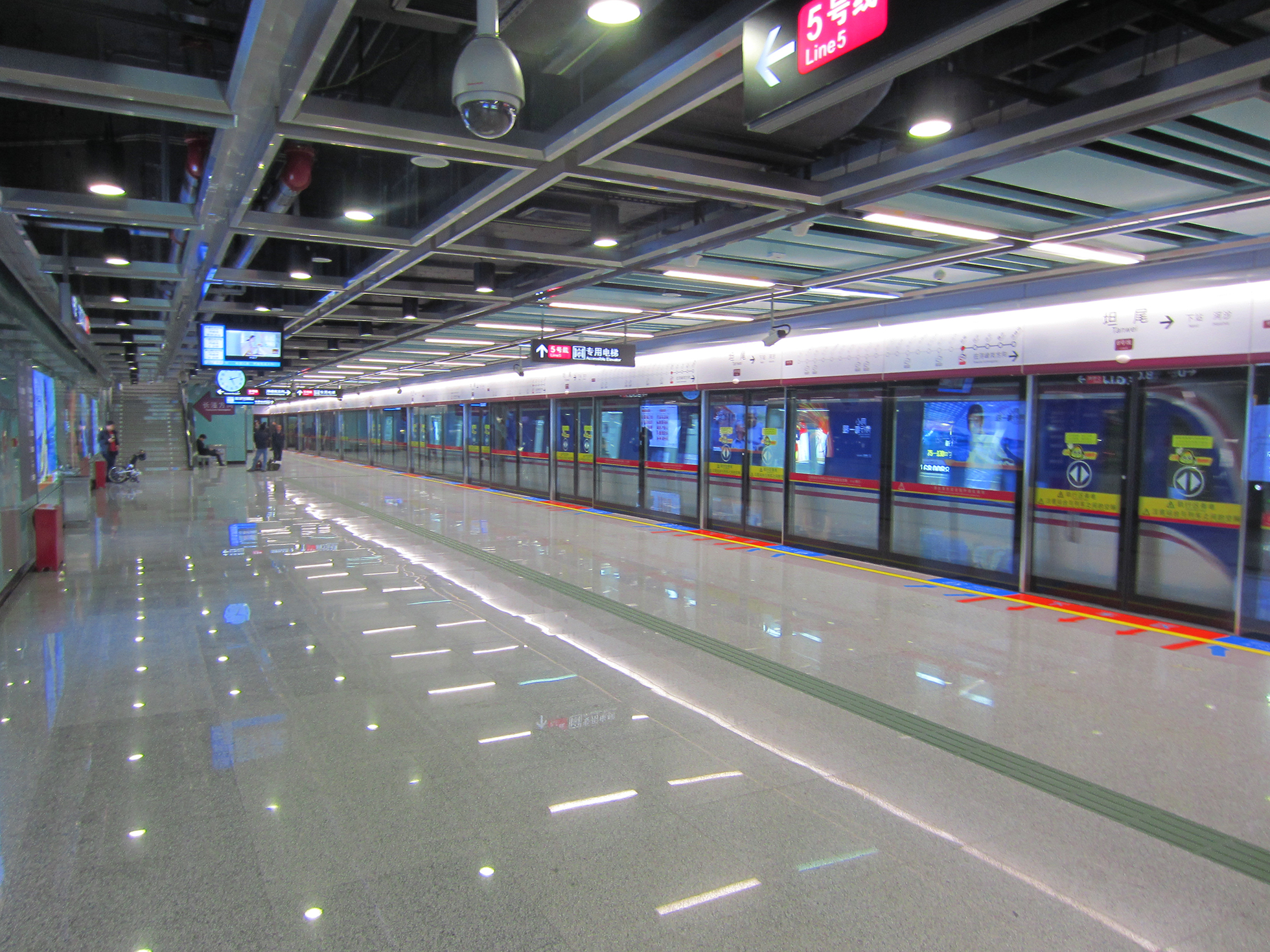 坦尾站6號線站台